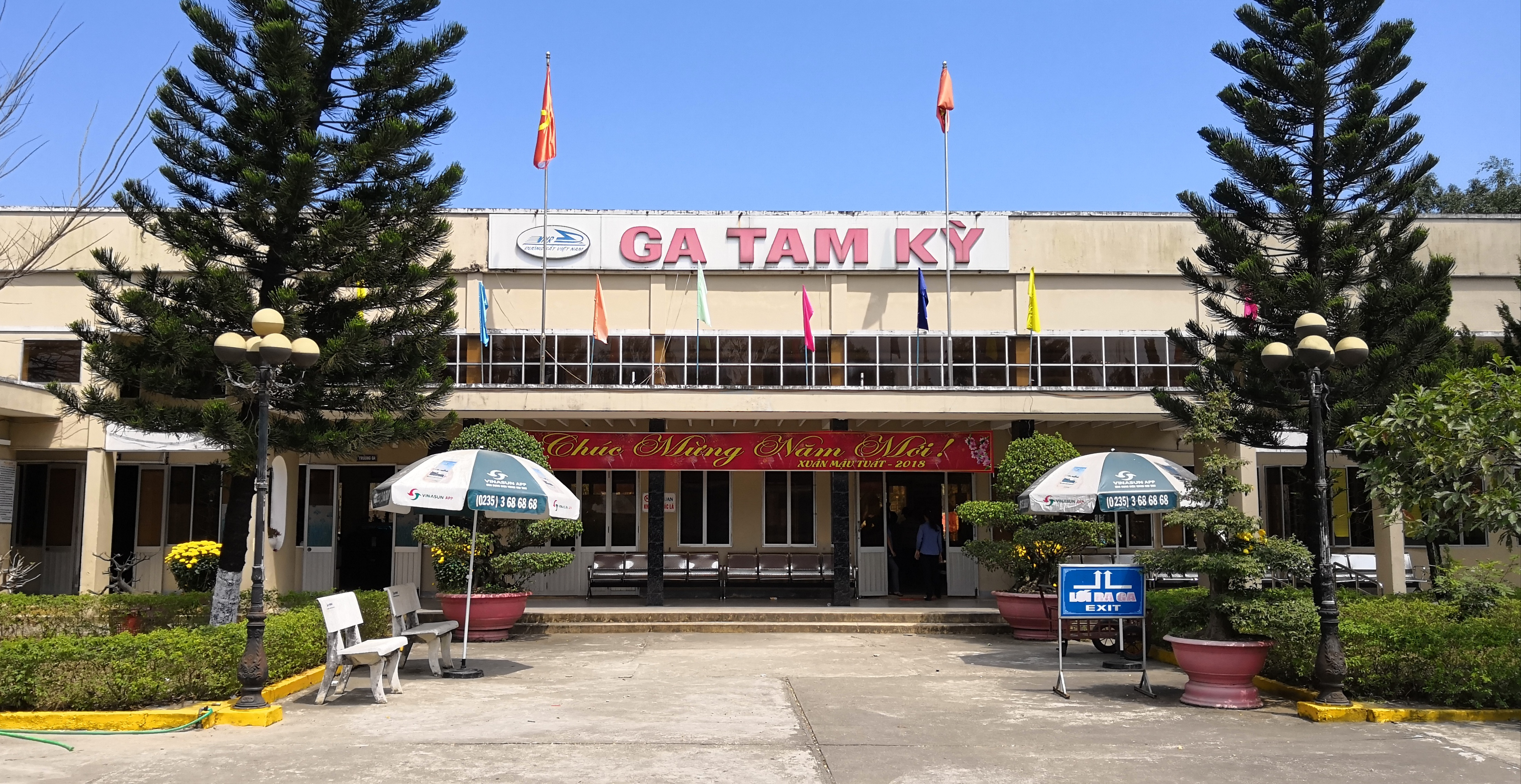 中文（中国大陆）: 越南铁路南北线三岐站。摄于2018年2月21日。